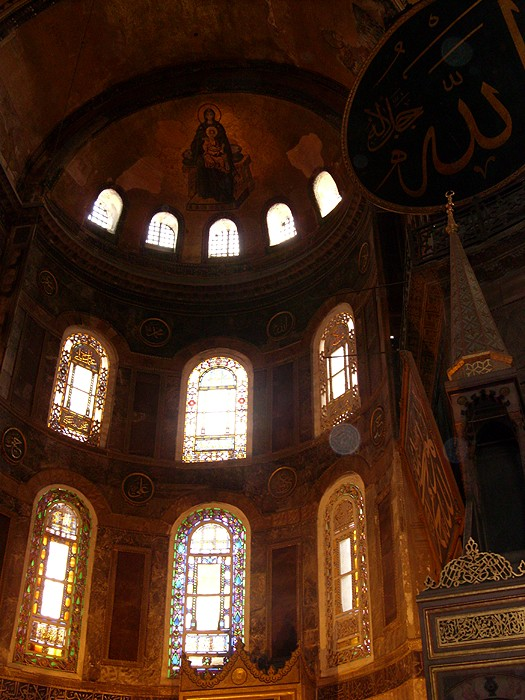 Istanbul - Interno della Basilica di S. Sofia (Abside con il mosaico della Vergine Maria)